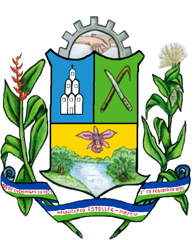 Escudo del municipio Esteller, estado Portuguesa, Venezuela